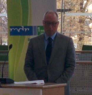 Matthias Grünberg während des Landesfinales Jugend debattiert im Sächsischen Landtag